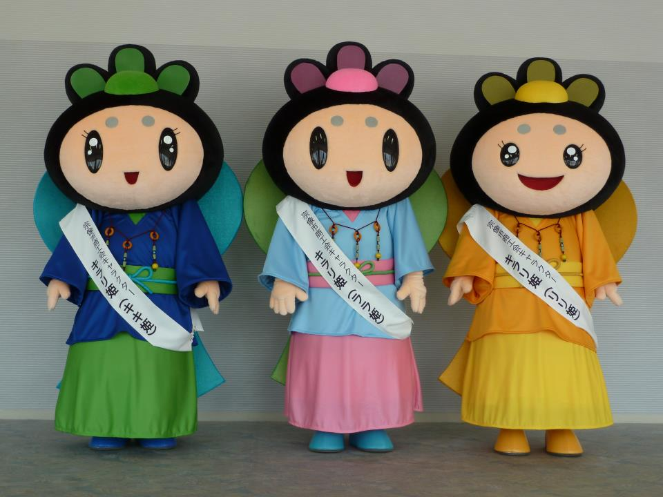 キラリ姫画像